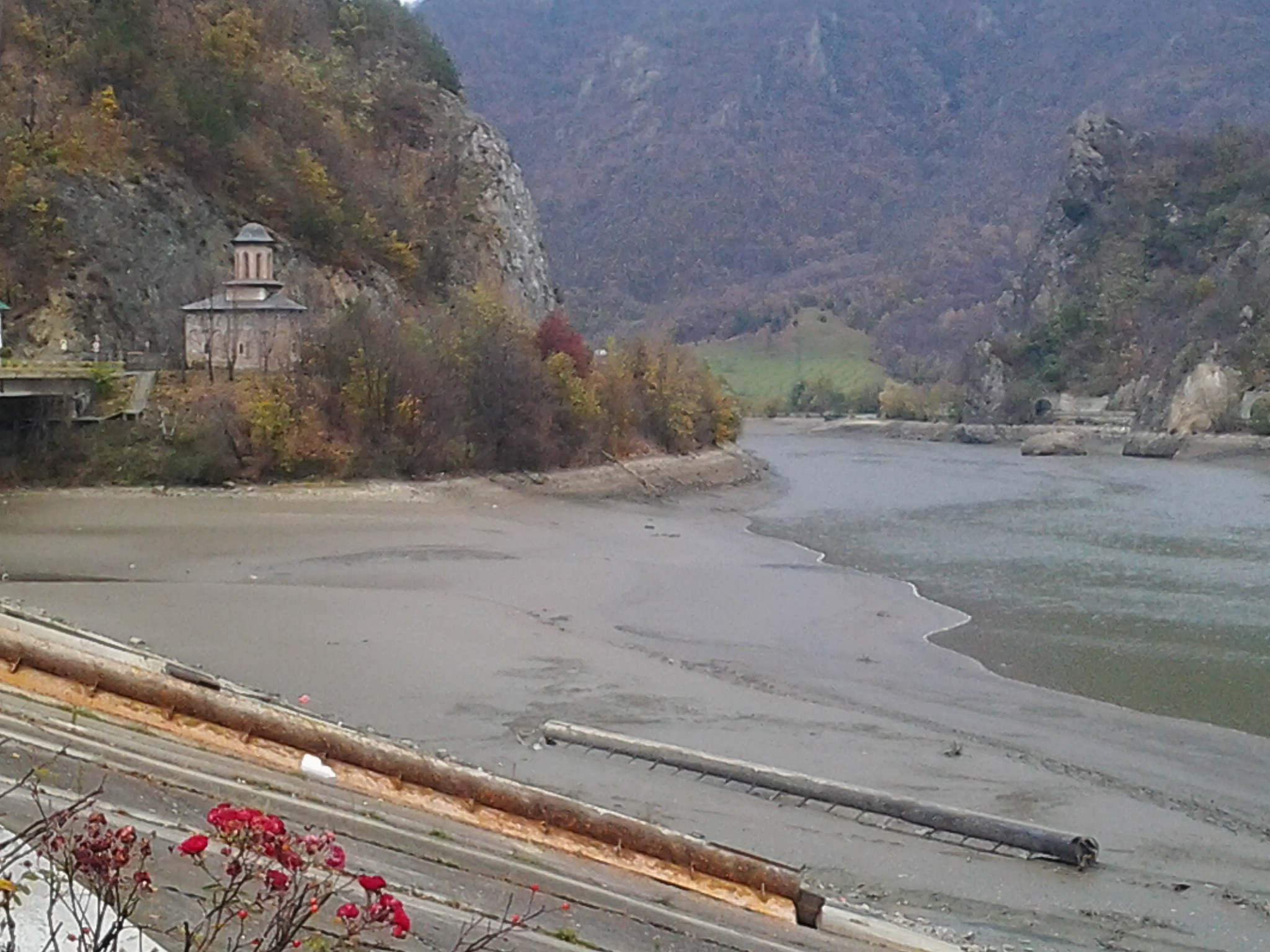 The Cozia Veche Hermitage (Skete)